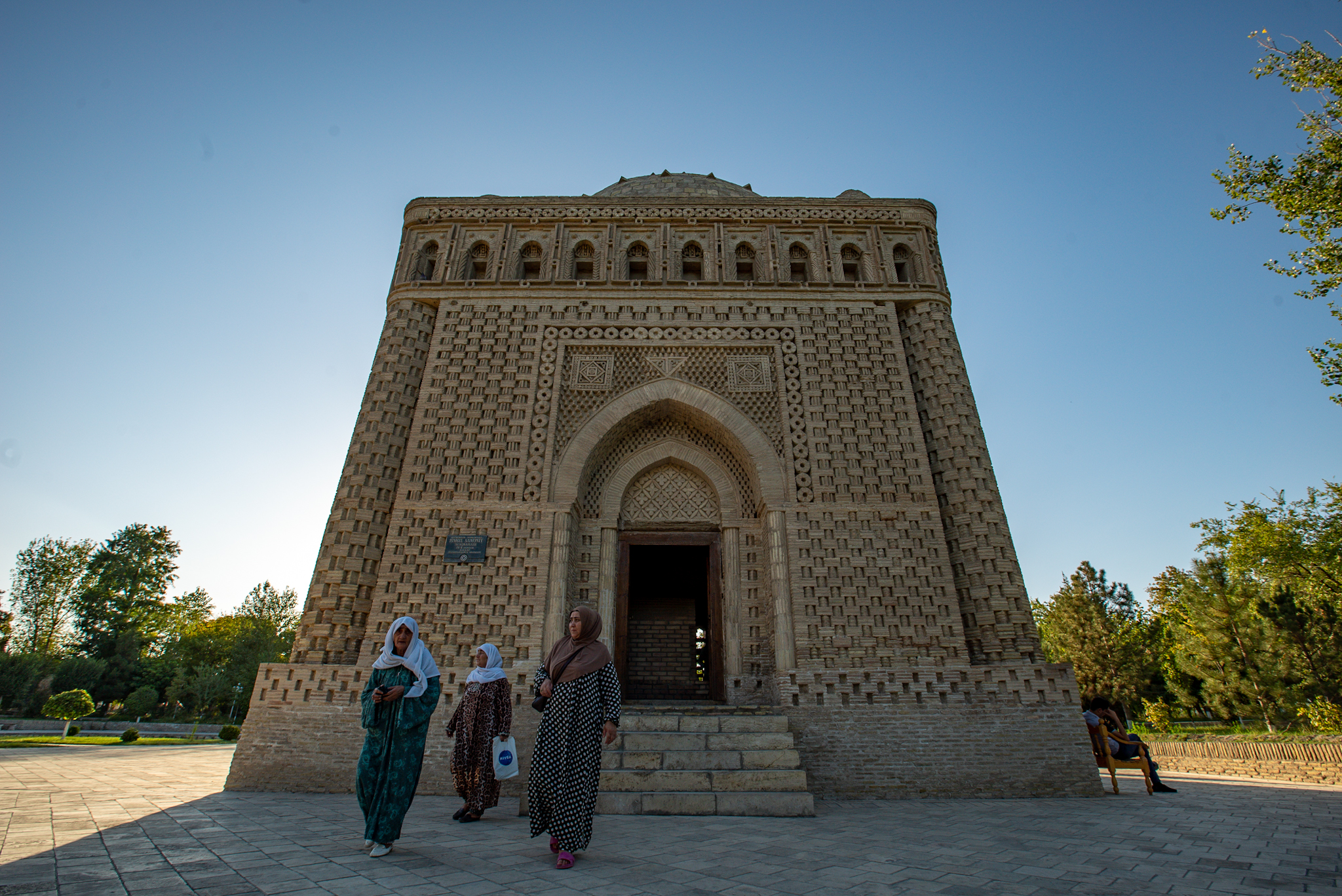 این عکس توسط پوریا افخمی در حاشیه ضبط برنامه تلویزیونی بلور بنفش به کارگردانی بهزاد بلور در شهر بخارا ثبت شده است.